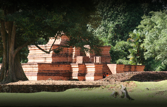 Candi Tinggi yang berdiri kokoh diareal tanah seluas 2.92 Ha. Candi Tinggi ini memiliki satu bangunan induk, 6 bangunan perwara dan pagar keliling, Bangunan induknya telah dipugar berdenah bujursangkar berukuran 16m x 16m dengan tinggi 7,6 meter. Saat ini keberadaan Candi Tinggi hanya bagian pondasi serta sedikit bagian kaki. Gapura menuju komplek Candi Tinggi terletak di bagian timur dan barat. candi-tinggi-3 candi-tinggi-7. Candi Tinggi ini ditemukan tahun 1820 dan dipugar dalam kurun 9 tahun sejak 1978 sampai 1987.